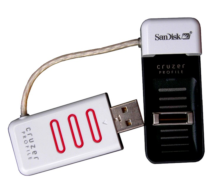 Sandisk Cruzer Profile fingerprint reader